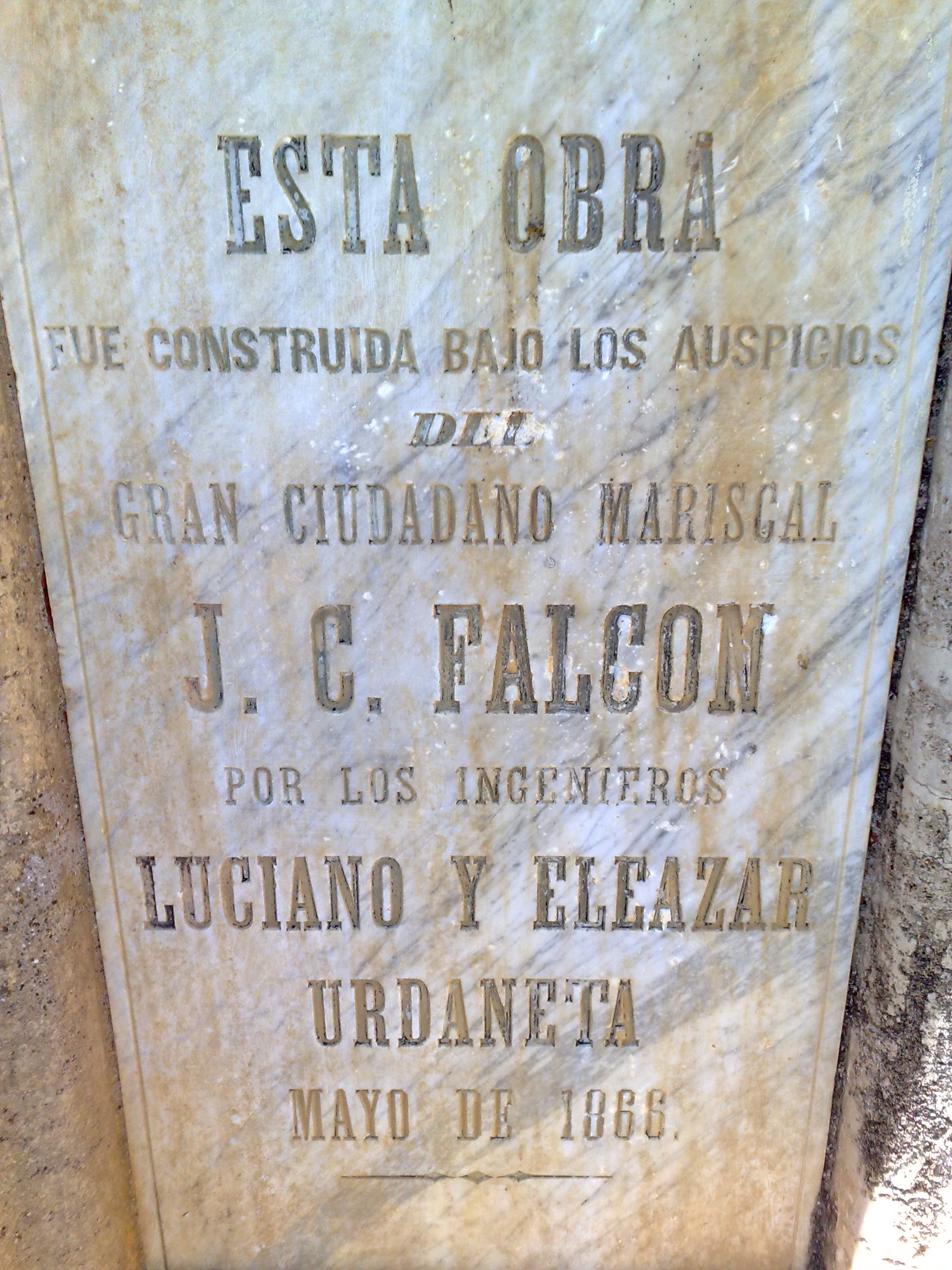 Placa fundacional en la represa de Caujarao, Estado Falcón.